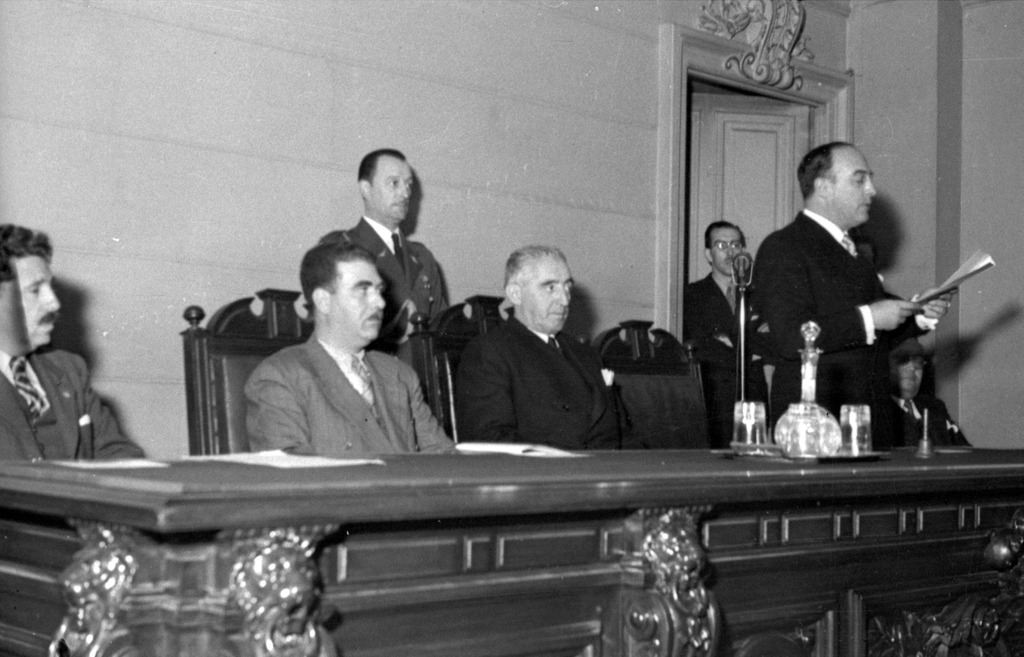 Reforma Constitucional 23 de Noviembre de 1943. Bajo la administración de Juan Antonio Ríos se efectúa la primera reforma a la Constitución de 1925, mediante la cual se da rango constitucional a la Contraloría General de la República, se incorpora la figura del decreto de emergencia y establece la iniciativa exclusiva del Presidente de la República en determinadas materias de ley. Estas reformas, de manera general, reducen las atribuciones del Congreso en relación al Ejecutivo.